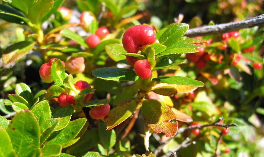 Alpenrosen-Apfel (Exobasidium rhododendri) auf Bewimperter Alpenrose (Rhododendron hirsutum) Aufgenommen von Benutzer:Tigerente am 28.08.2004 Fundort: Nazogl, Steiermark, Österreich